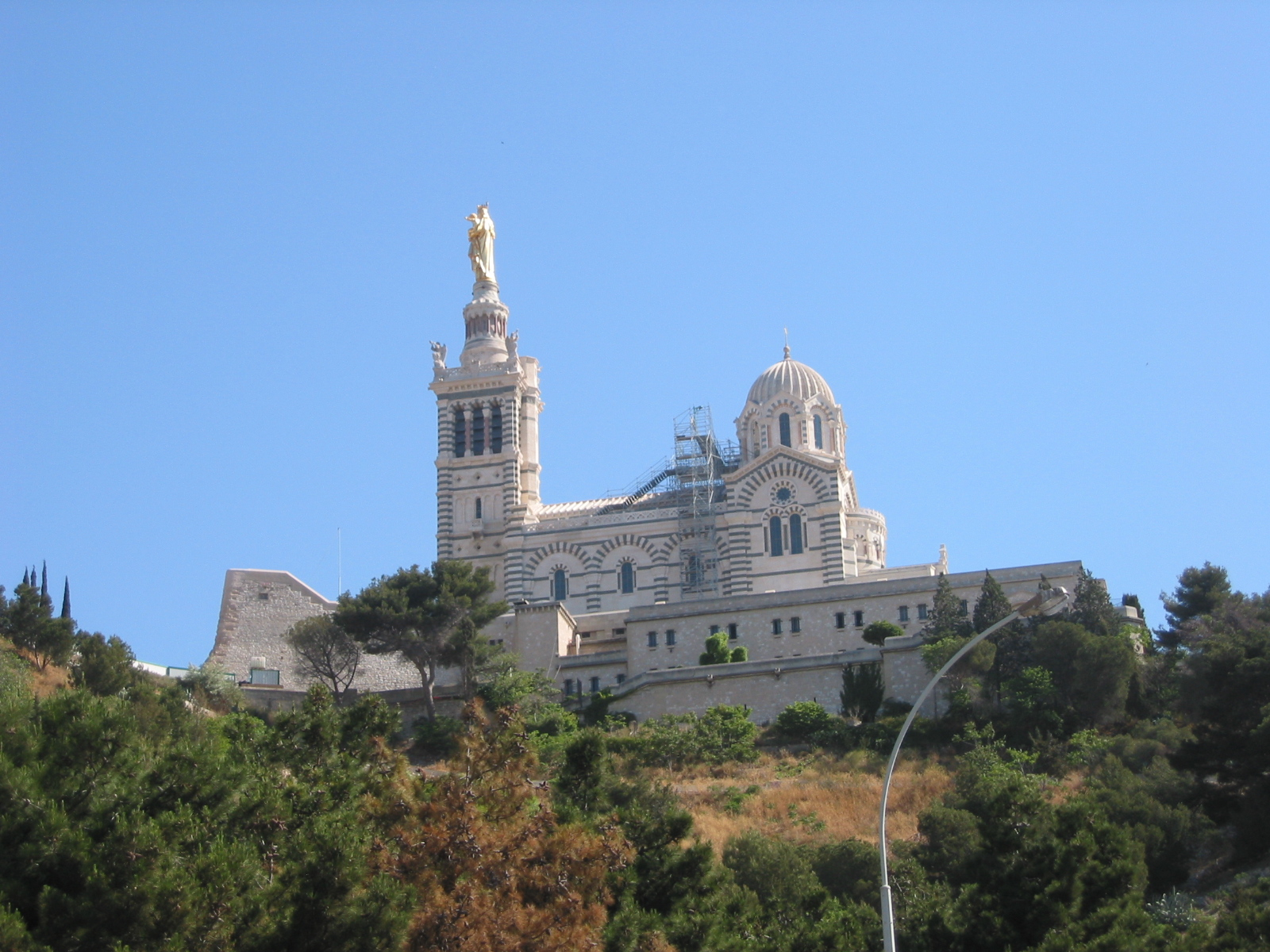 Marseille, Bouches-du-Rhône, France Notre-Dame de la Garde Photo prise le 19 mai 2006 Aut : Jddmano